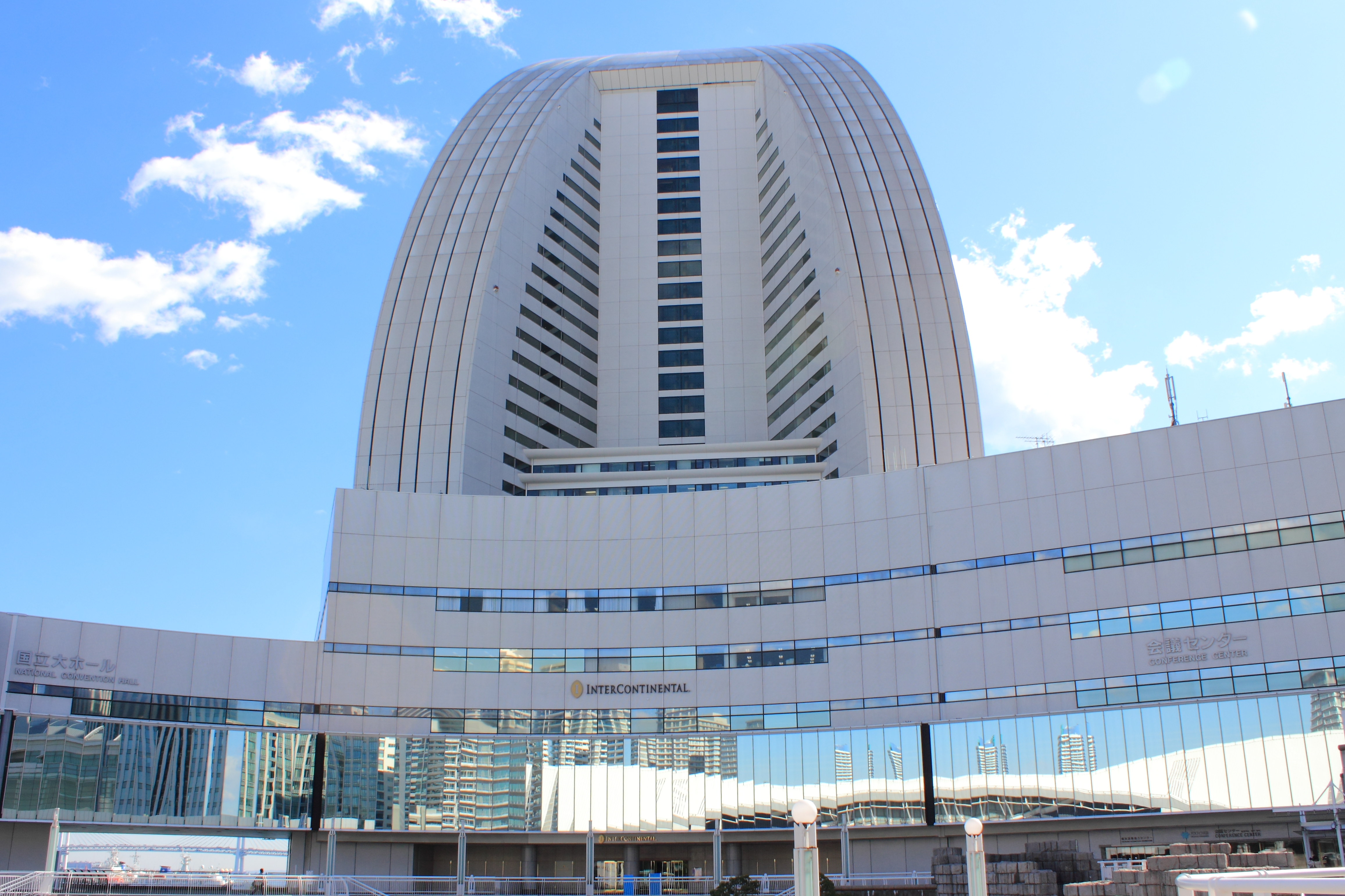 横浜国際平和会議場（ヨコハマグランドインターコンチネンタルホテルと会議センター）